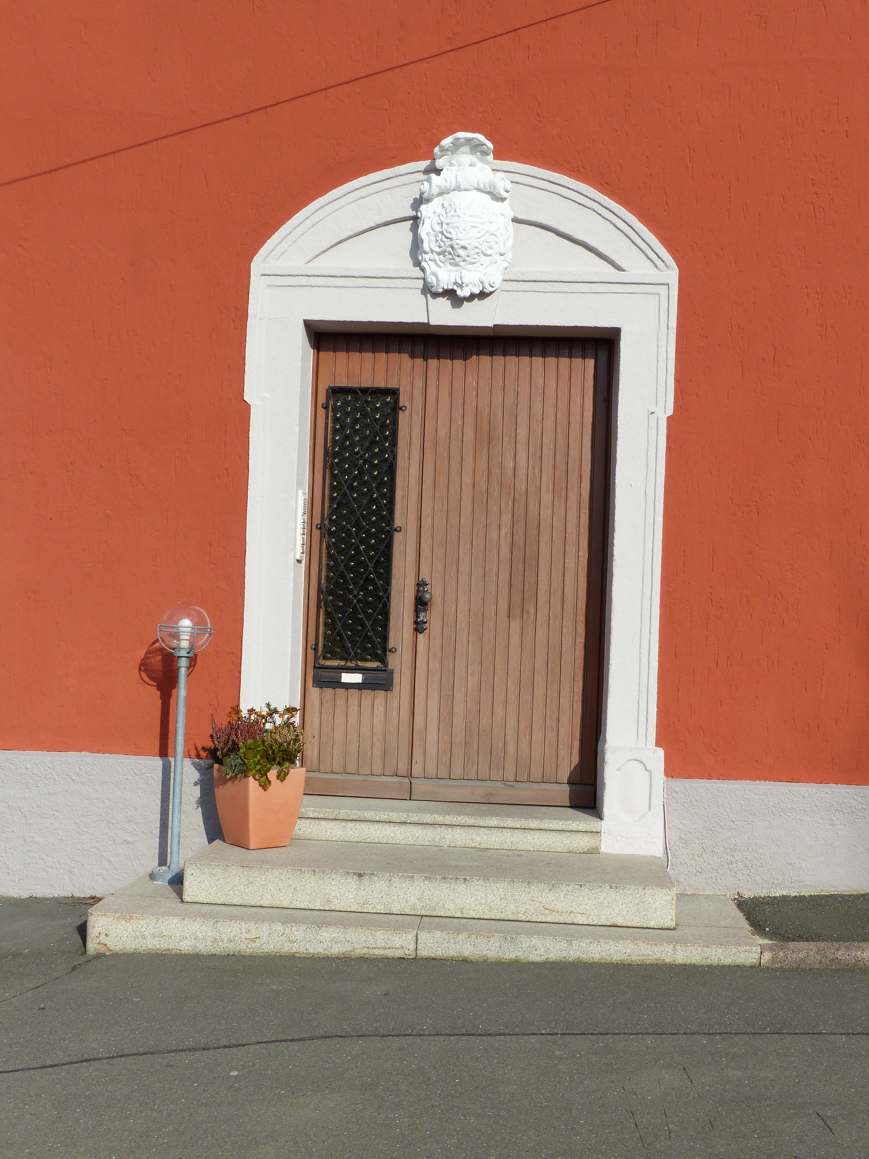 Ansicht des Feezschen Amtshauses in Sparneck